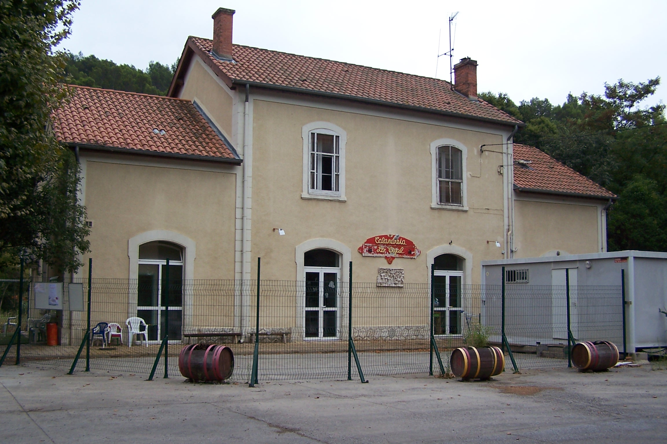 Gare de Bize en 2013, vue depuis le parvis